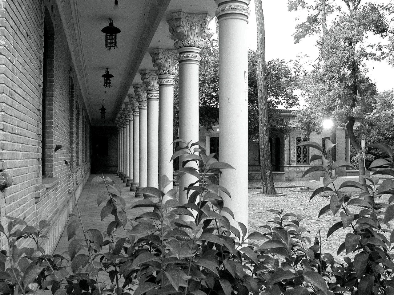 Gheytarieh park in Tehran